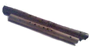 Bamboefluiten